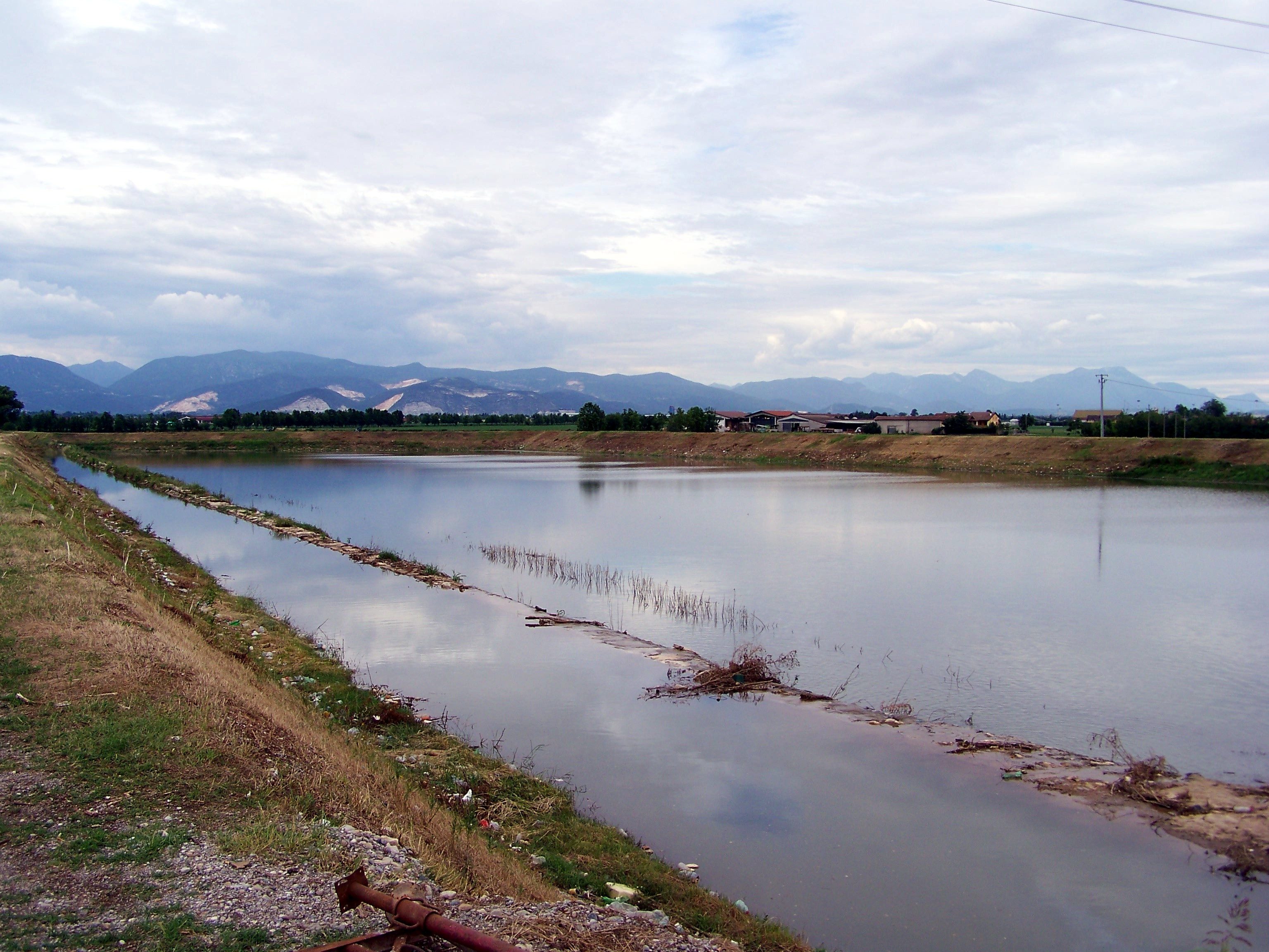 Il bacino di contenimento del Garza presso Montichiari a nord della località Belvedere di Ghedi.